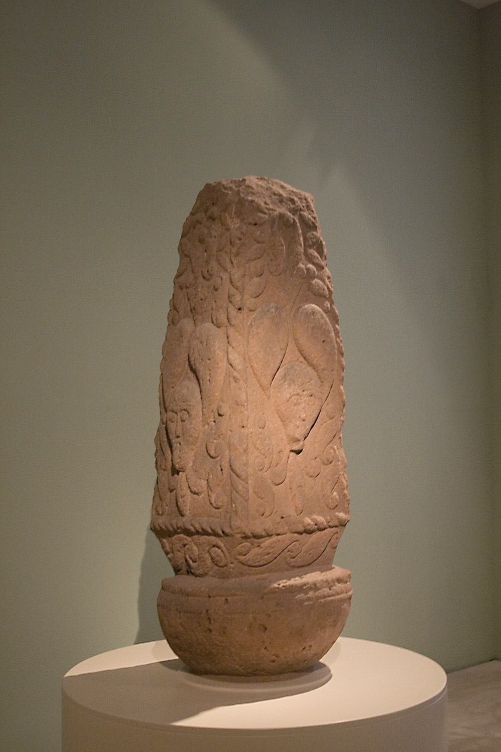 Die Pfalzfelder „Flammensäule“, ein keltischer Obelisk. Gefunden im rheinland-pfälzischen Pfalzfeld, aufgestellt im Rheinischen Landesmuseum Bonn.